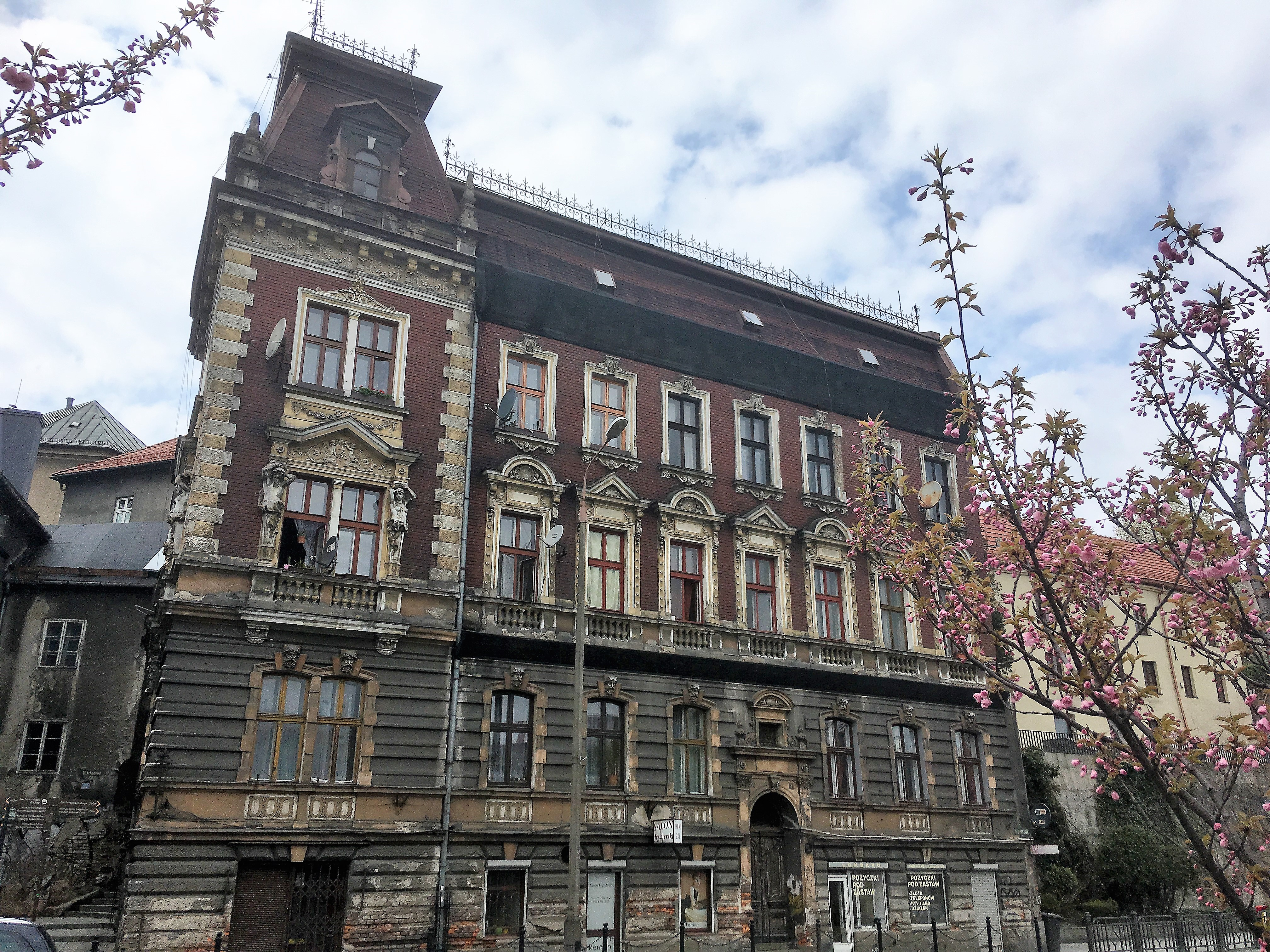 Kamienica przy ul. Zamkowej 8